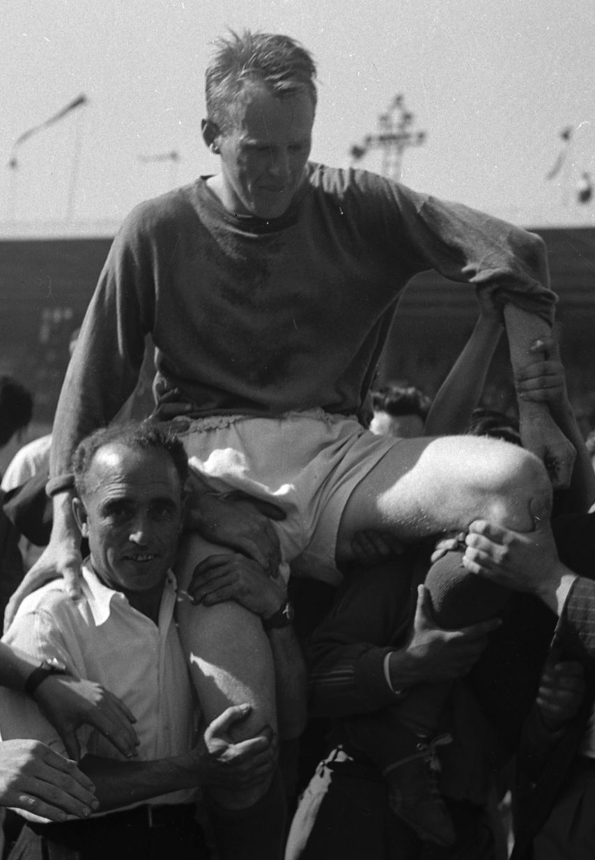 Stadium municipal de Toulouse, 1 bis allées Gabriel Biénès. 24 mai 1953. Vue d'un groupe de supporters portant en triomphe le joueur toulousain Bror Mellberg, meilleur buteur du championnat de deuxième division, à l'issue du match entre le Toulouse Football Club et le Cercle Athlétique de Paris, dernière rencontre de la saison qui voit le club toulousain sacré champion de deuxième division.